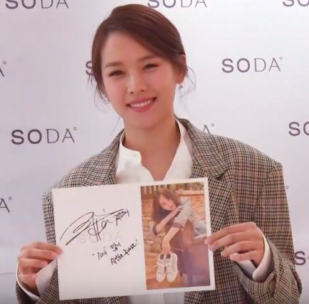 조윤희가 7일 오후 인천광역시 미추홀구 관교동 롯데백화점에서 열린 한 브랜드 포토행사에 참석했다.